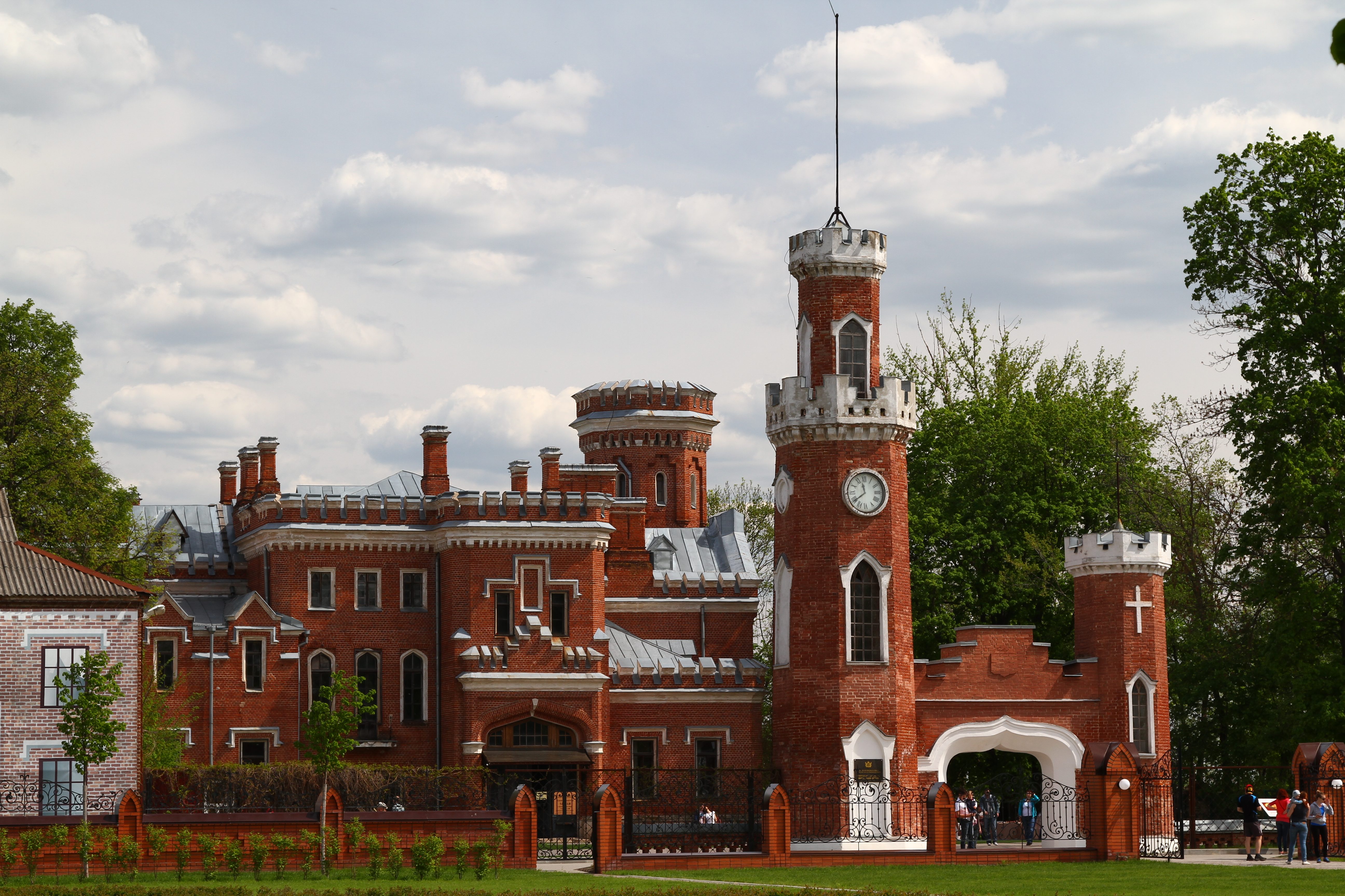 Дворец принцессы Ольденбургской: Рамонь, Рамонский район, Воронежская область